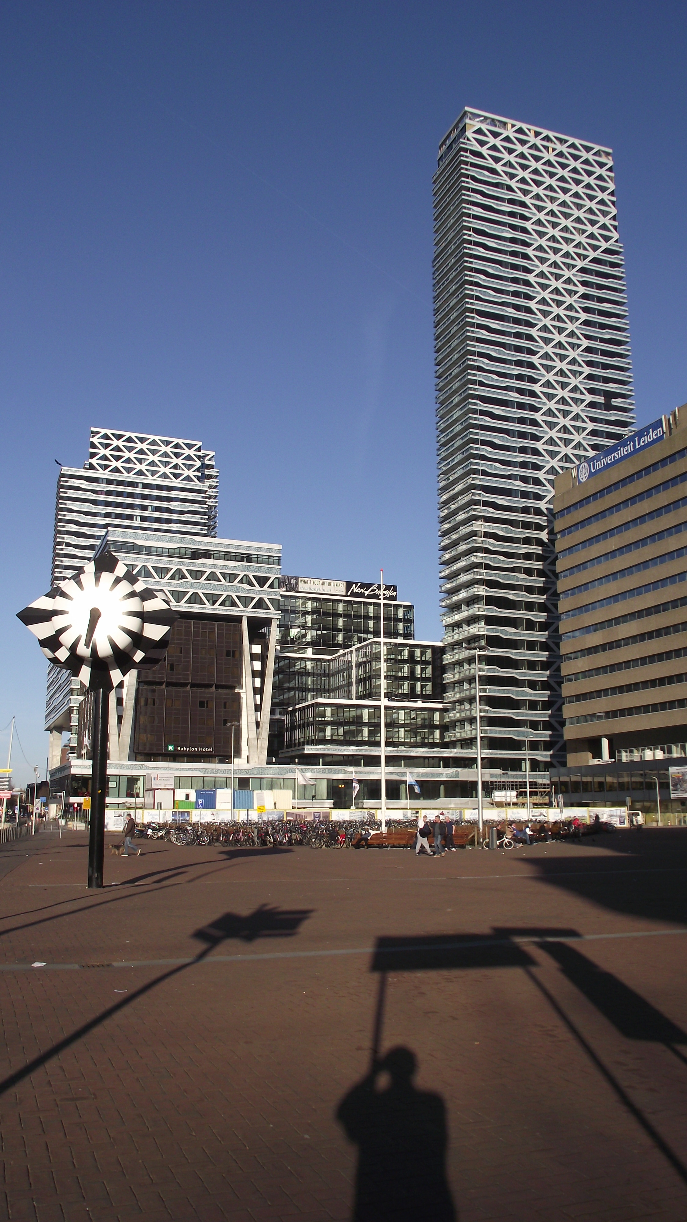 Winkelcentrum Nieuw Babylon op het Koningin Julianaplein in Den Haag, met de teruggeplaatste 'zebraklok'